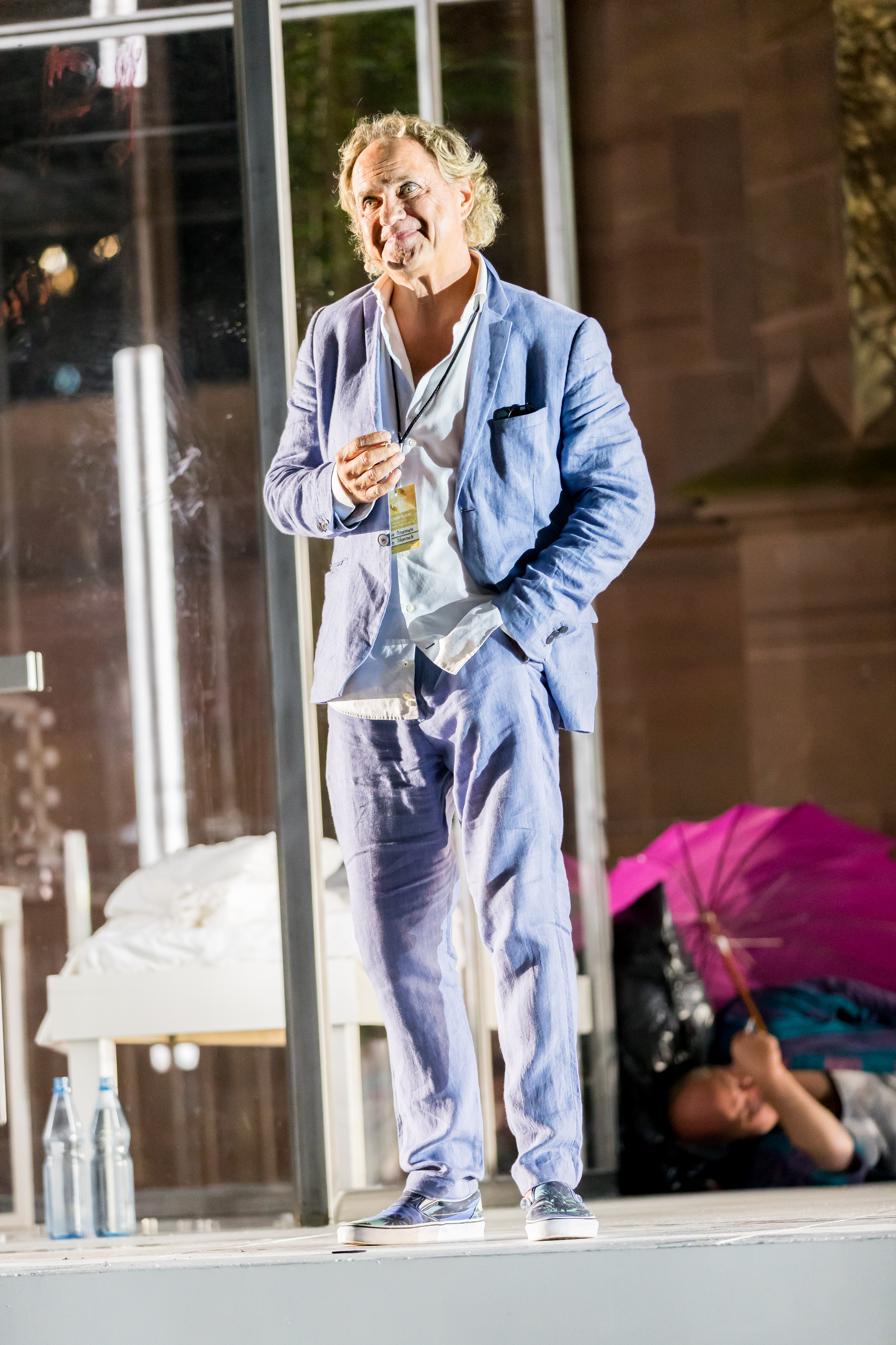 2016: Uraufführung: "GOLD. Der Film der Nibelungen" Regie: Nuran David Calis Autor: Albert Ostermaier Intendant: Nico Hofmann --- Ensemble: Produzent Konstantin Trauer: Uwe Ochsenknecht Regisseur Arsenij Kubik: Vladimir Burlakov Drehbuchautor Charlie P. Weide: Josef Ostendorf Society Reporter Peter Scheumer: Dominic Raacke Kamerafrau "the eye": Anna Rot Setdesignerin "set": Joy Maria Bai Assistentin des Produzenten Carmen: Alexandra Kamp Maskenbildnerin Sueyla Blume : Ayse Bosse die Ältere Kriemhild Karina Bergmann: Katja Weitzenböck die Jüngere Kriemhild Simone Gehel: Constanze Wächter die Ältere Brünhild Lotte Jünger: Michaela Steiger die Jüngere Brünhild Nathalie Aurun: Dennenesch Zoudé Siegfried Mohamad Söder: Ismail Deniz Hagen René Inner: Sascha Göpel Gunther Klaus Castel: Maximilian Laprell Bürgermeister Franz Koppoler: Heiner Lauterbach during Nibelungenfestspiele "GOLD. Der Film der Nibelungen" at Wormser Kaiserdom, Worms, Rheinland Pfalz, Germany on 2016-07-12, Photo: Sven Mandel